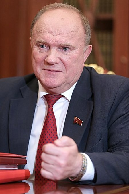 Руководитель фракции «Коммунистическая партия Российской Федерации» в Государственной Думе, председатель Центрального комитета КПРФ Геннадий Зюганов